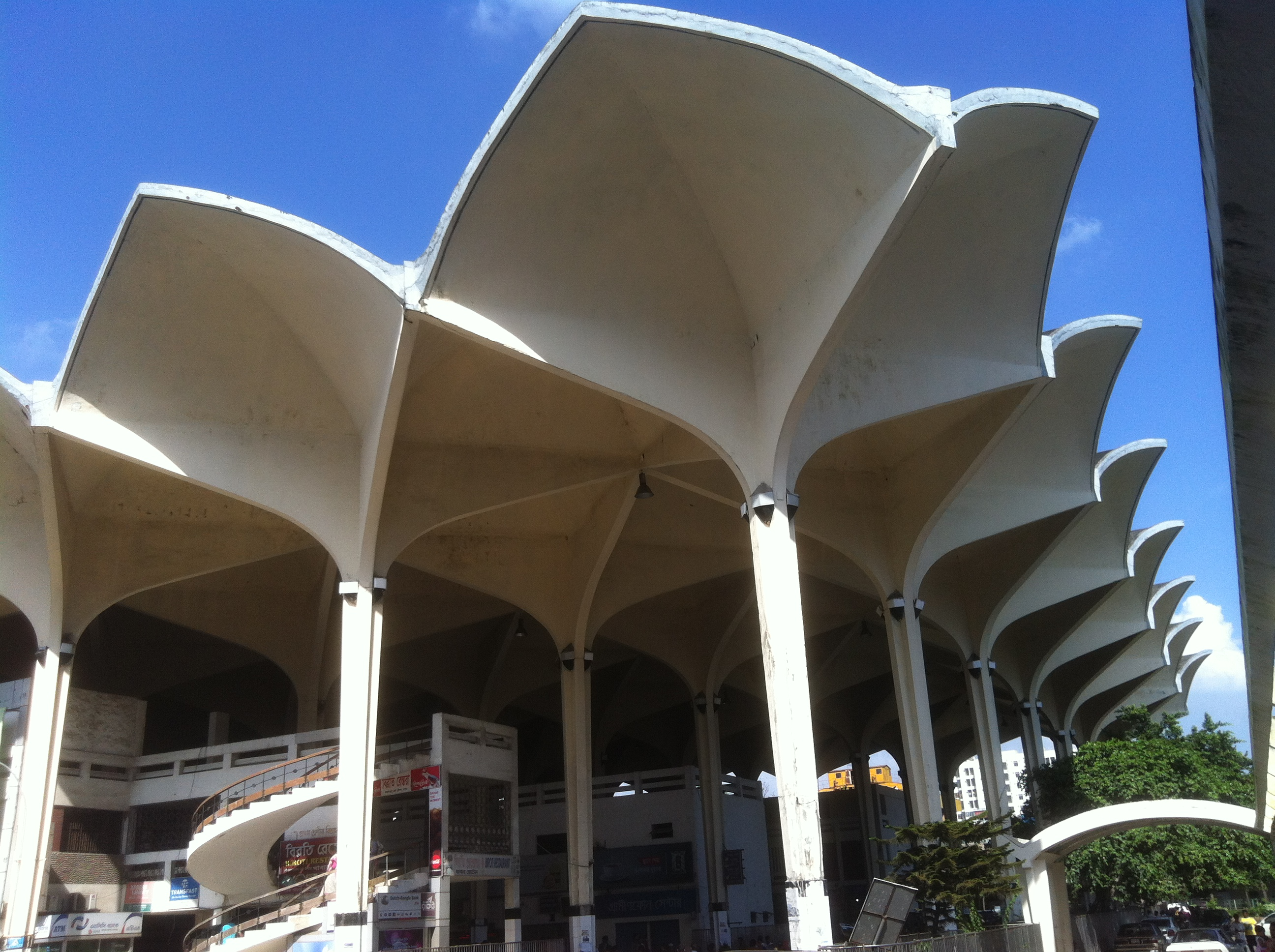 কমলাপুর রেলস্টেশন